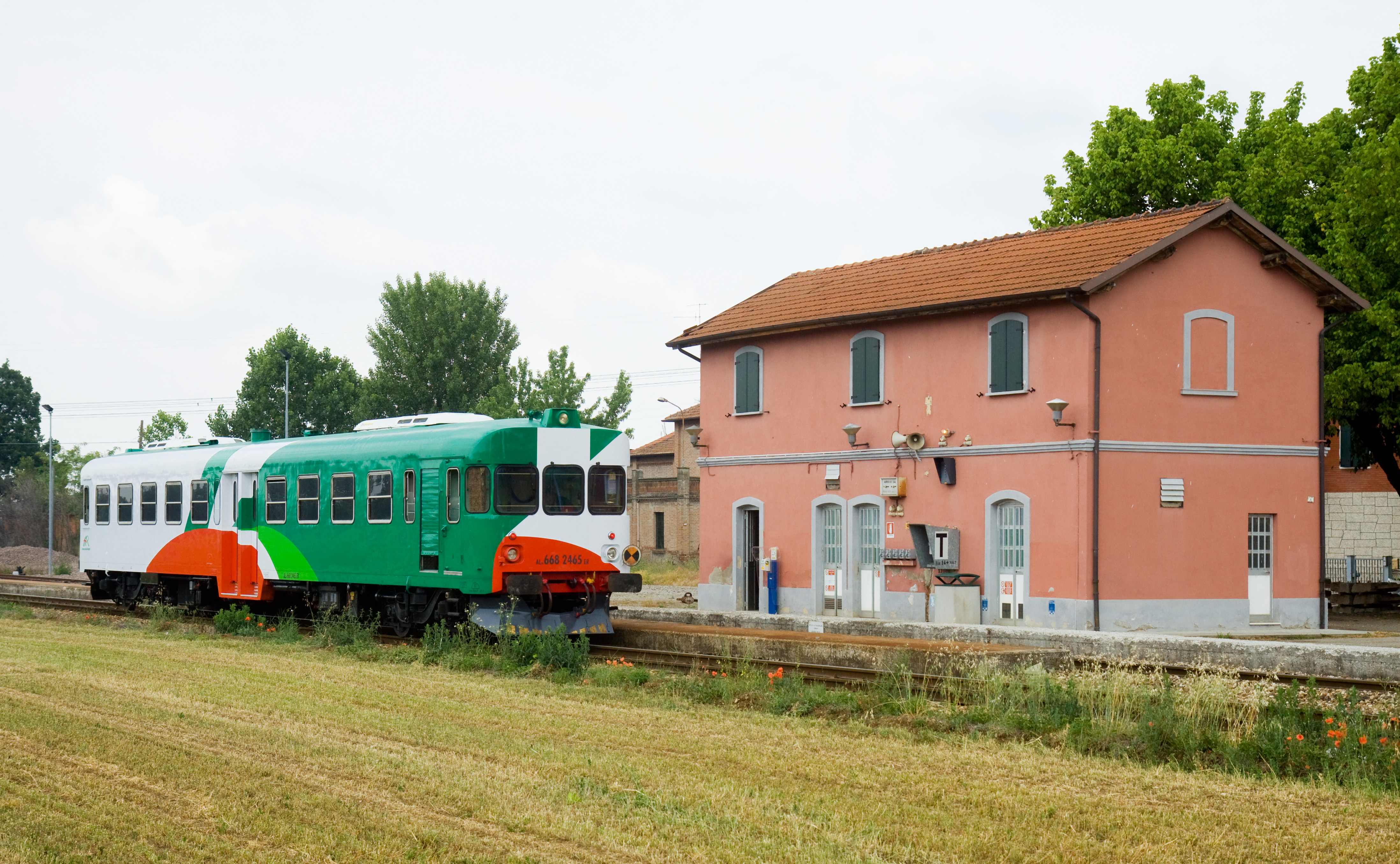 Stazione ferroviaria di Bosco, sulla linea Reggio–Sassuolo. È in sosta l'automotrice ALn 668.2465 delle Ferrovie Emilia Romagna.